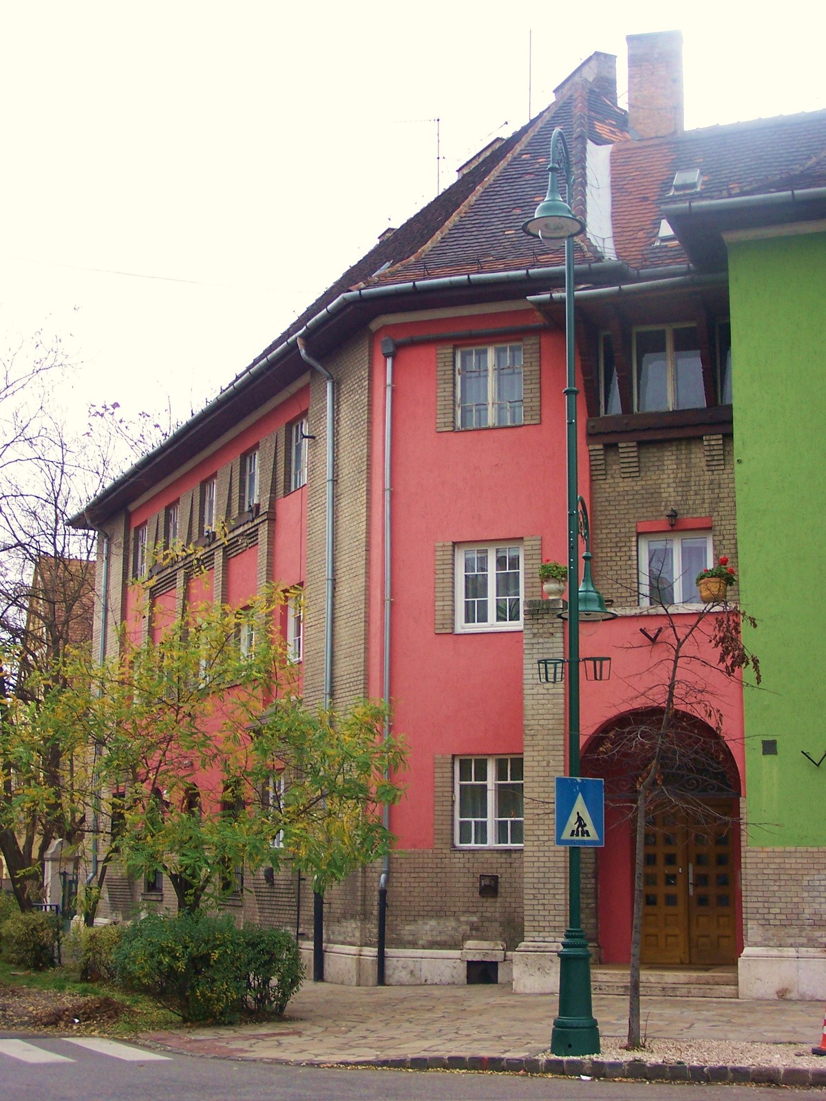 Lakóház (Budapest 19, Kós Károly tér 9.) This is a photo of a monument in Hungary. Identifier: 1263